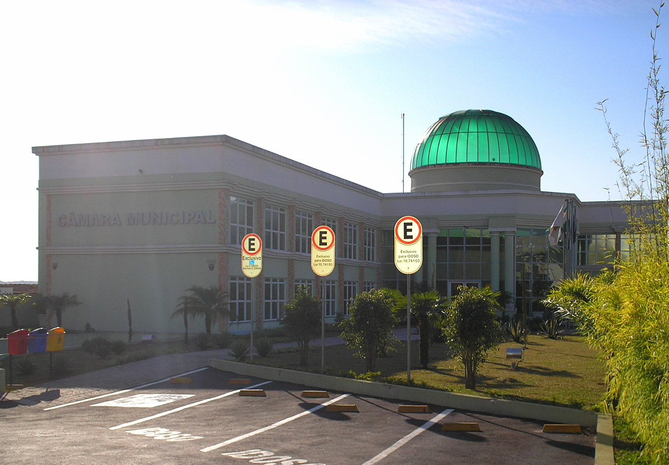 Câmara Municipal de Quatro Barras (Grande Curitiba), PR, Sul do Brasil.